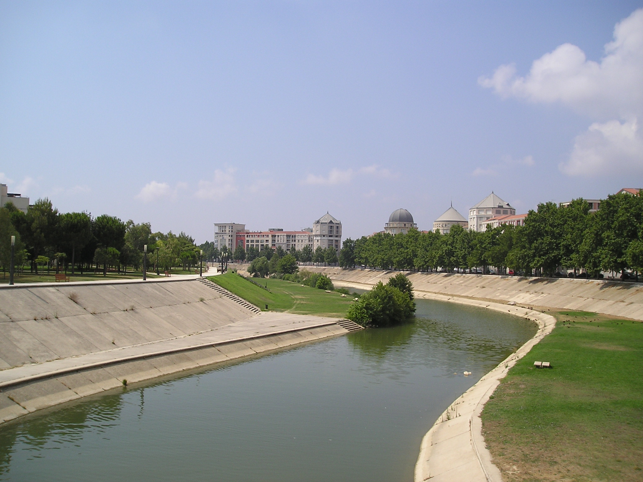 Les bords du Lez à Montpellier : vue tournée vers le sud depuis la passerelle des Barons-de-Caravettes. A droite, les nouveaux immeubles de la rue du Pirée ; à gauche, le parc de Richter. Cette image est prise du même endroit que Image:Montpellier Lez verslenord 18072006.JPG tournée vers le nord.